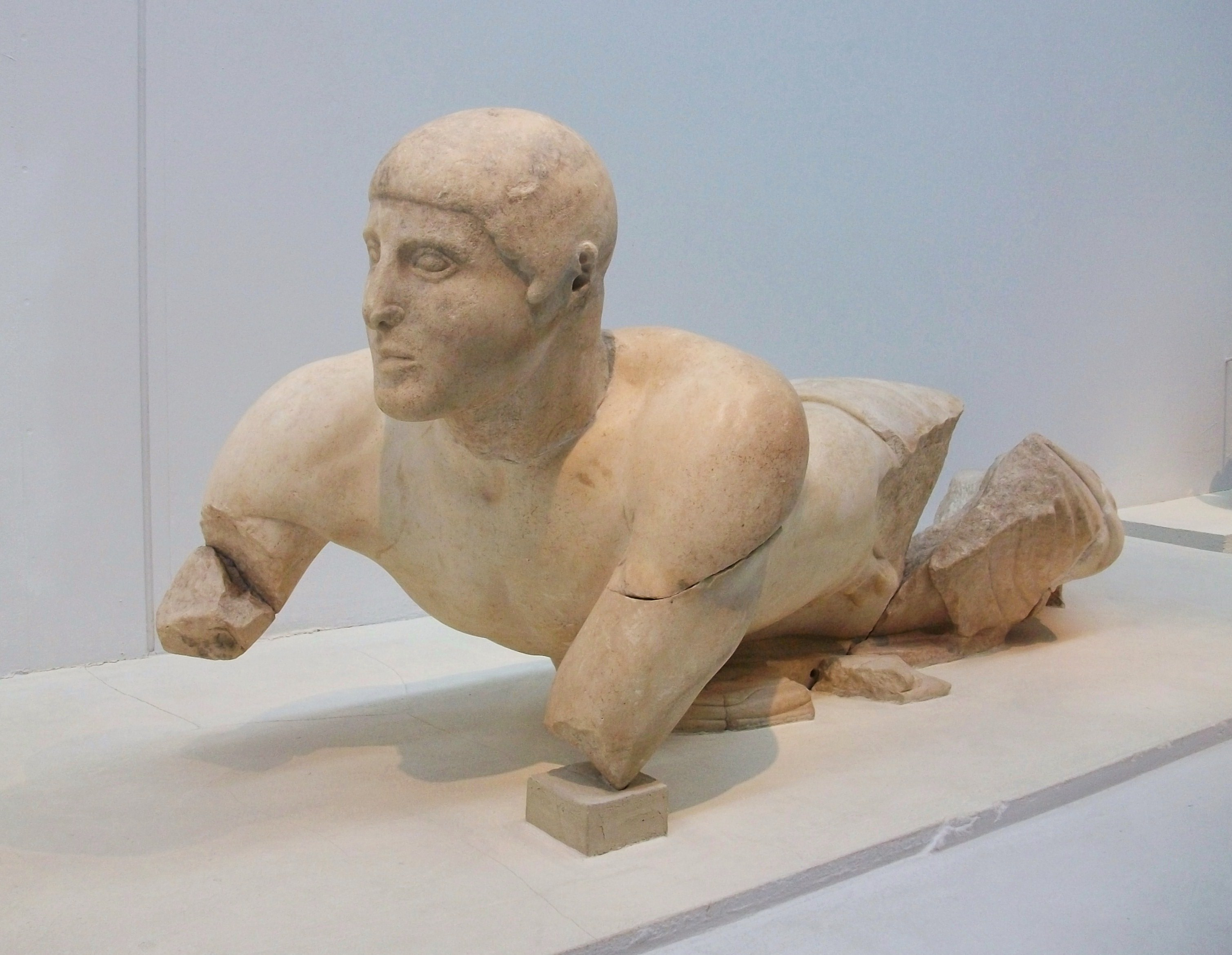 Riu Cladeu - Kladeos al frontó oriental del temple de Zeus, Museu Arqueològic d'Olímpia.